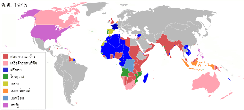 แผนที่สงครามโลกครั้งที่สอง ในช่วงปี ค.ศ. 1945